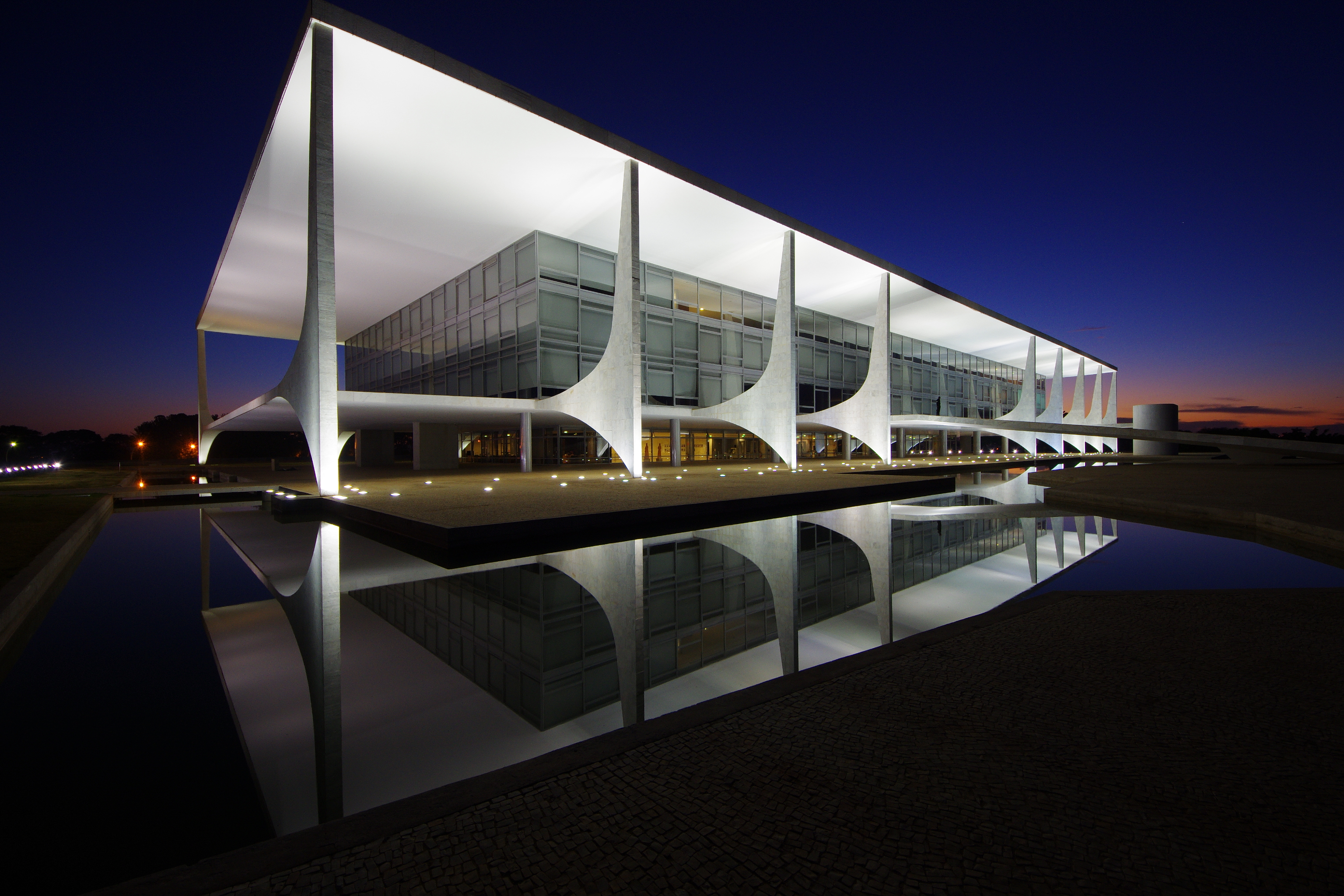 Palácio do Planalto ao entardecer - DF, BRASIL